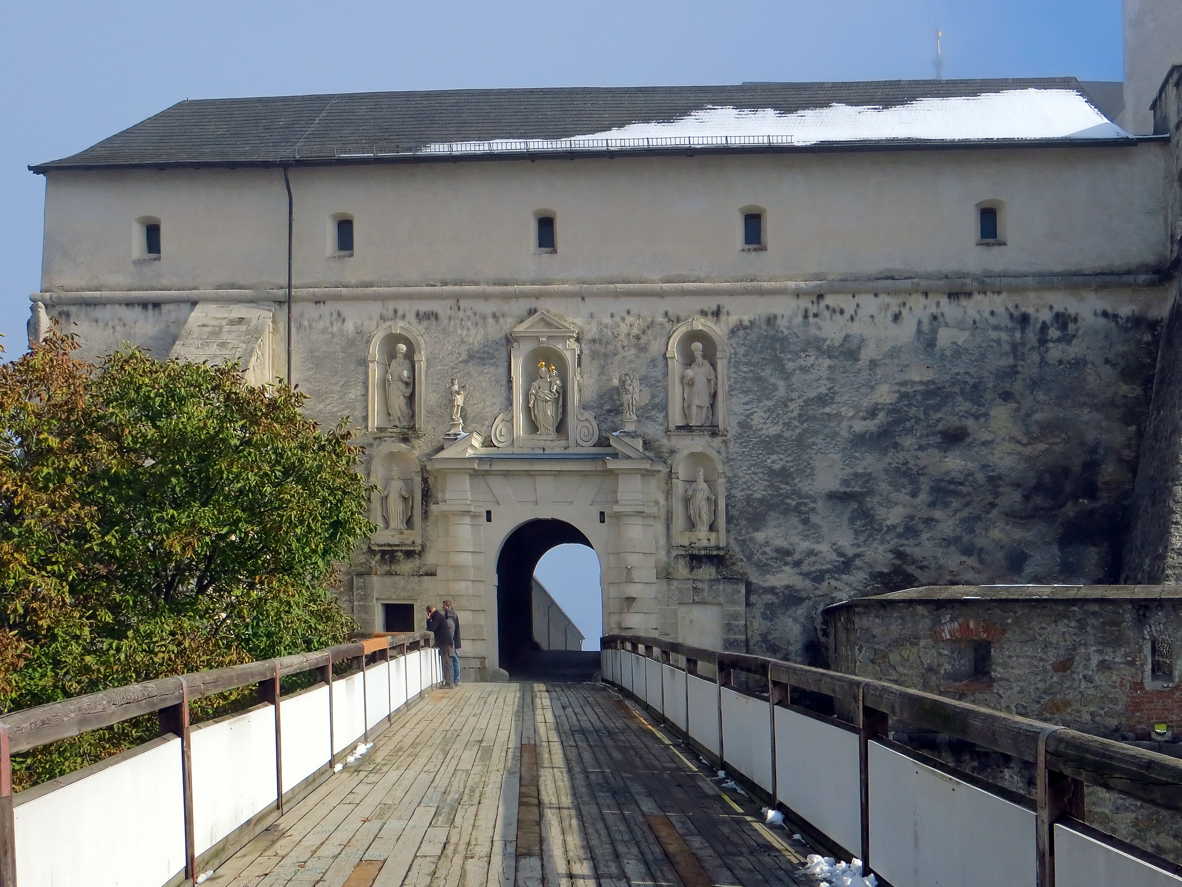 Burg Forchtenstein